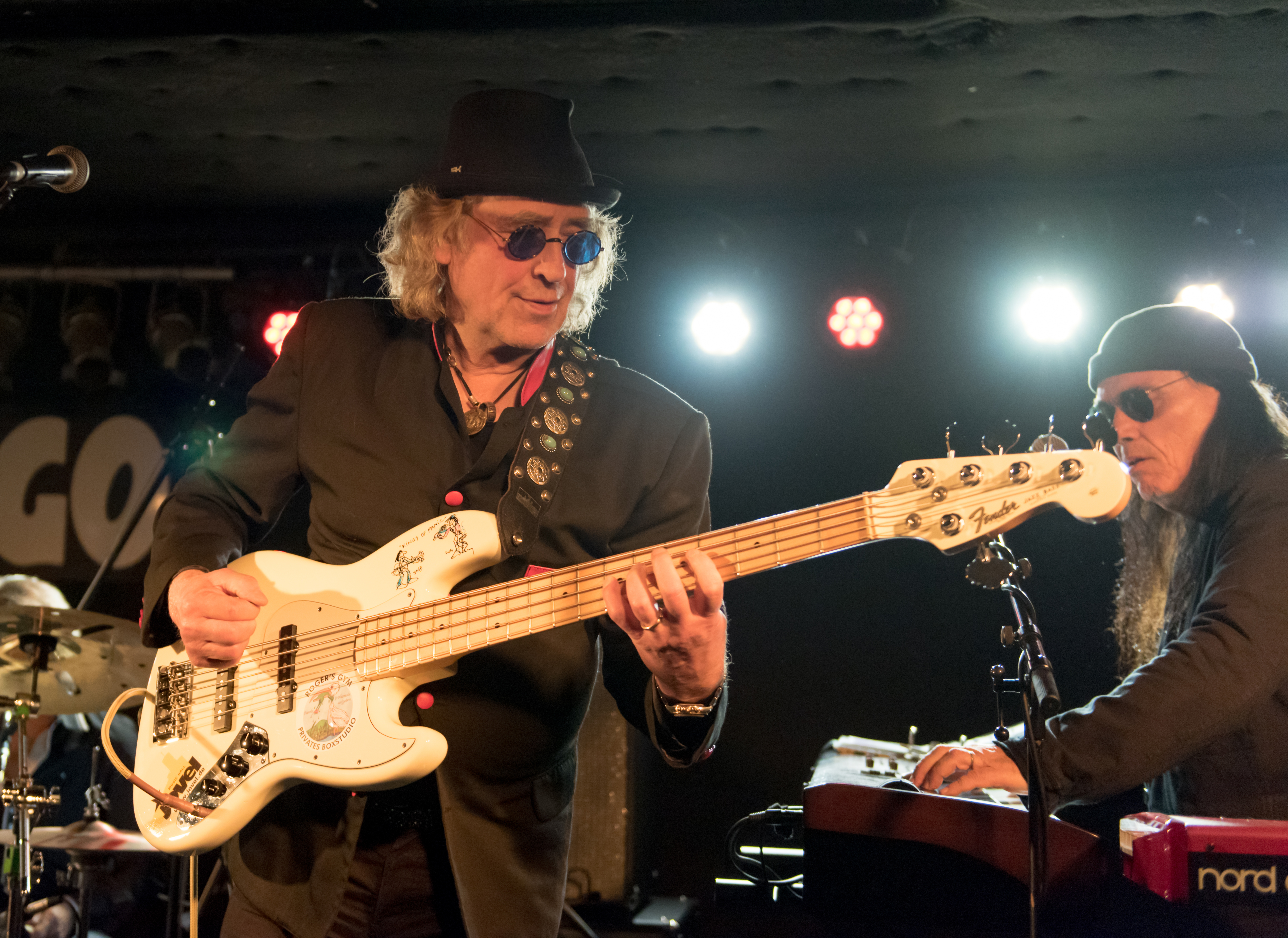 Zöller & Konsorten bei der Flucht nach vorn Tour 2016 im Logo Hamburg